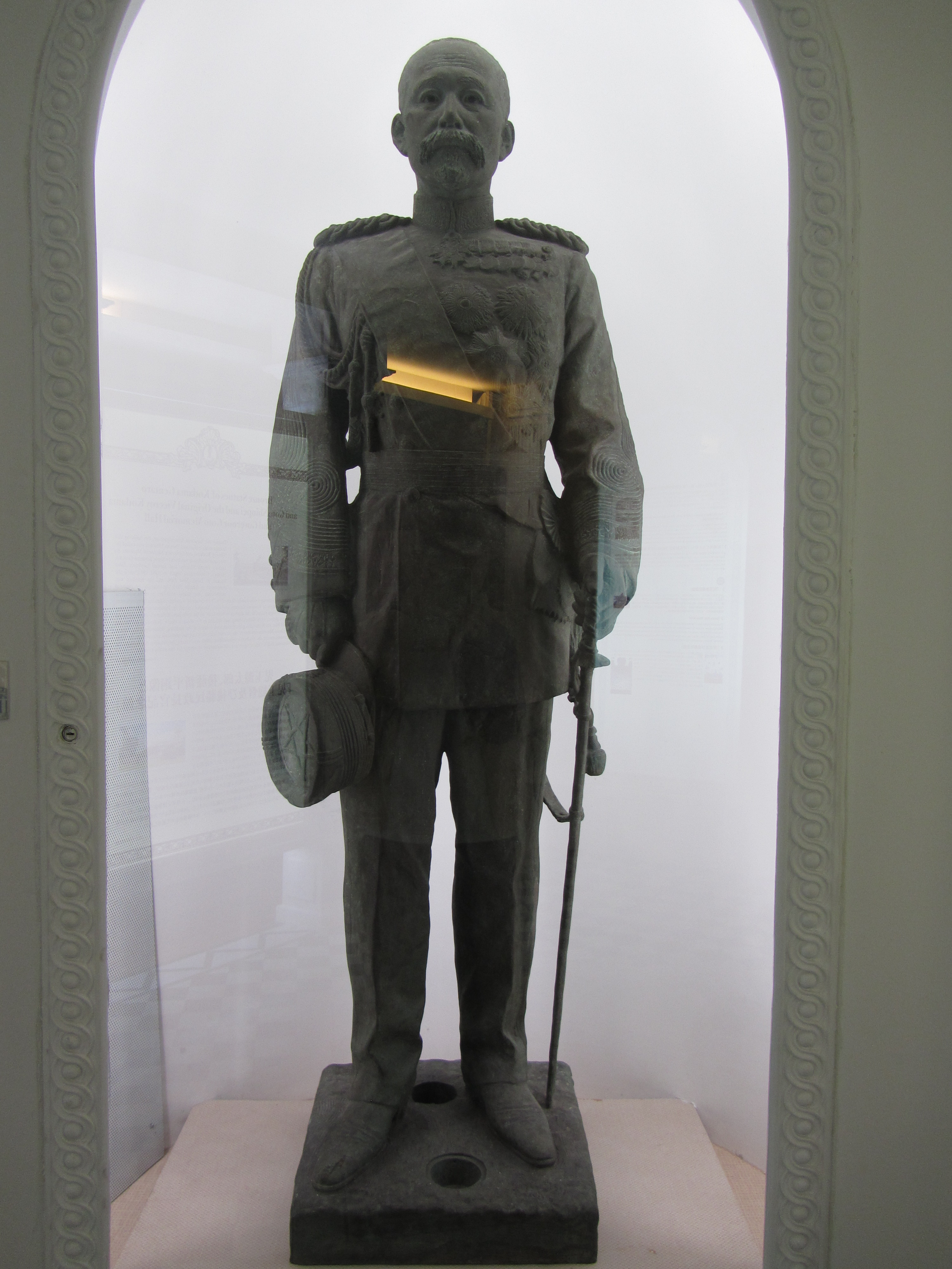 國立臺灣博物館內的兒玉源太郎銅像。